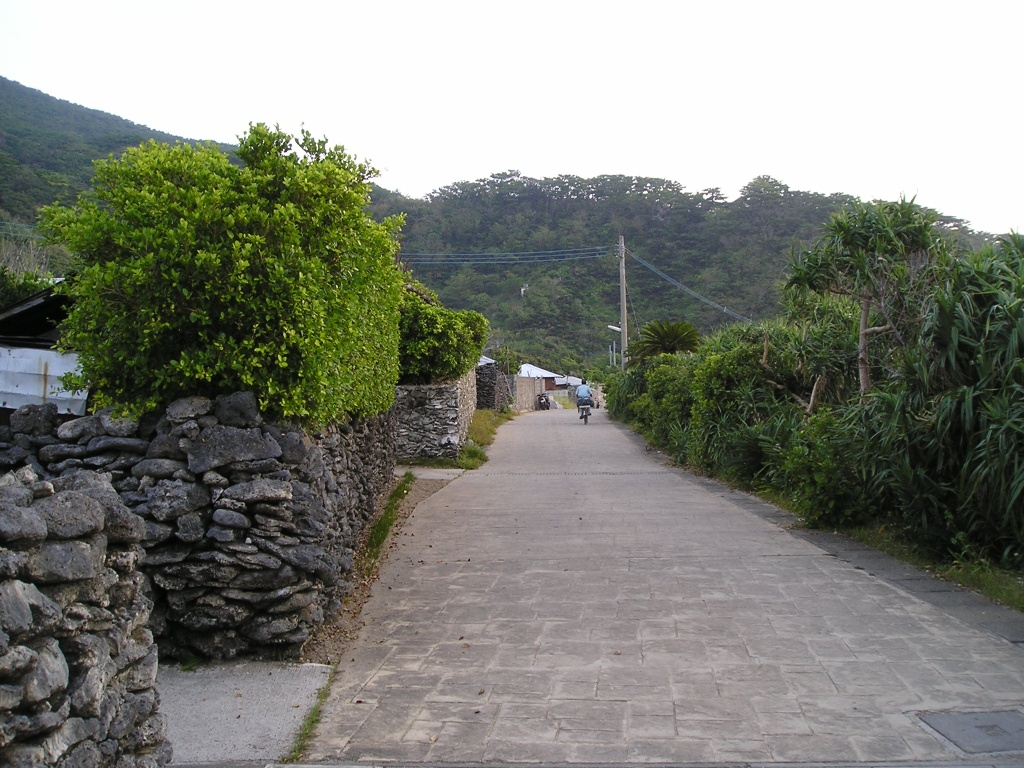 鹿児島県・奄美諸島にある「与路島」の集落の風景。島の家々は珊瑚石を積み上げて外壁としており、景観上の特徴となっている。